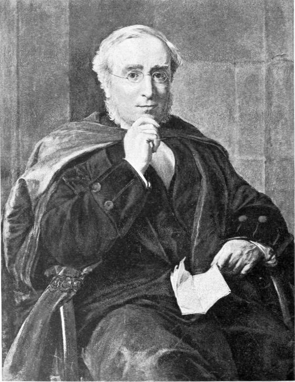 Isambard Kingdom Brunel FRS (/ˈɪzəmˌbɑːd bruːˈnɛl/; 9 April 1806 – 15 September 1859)